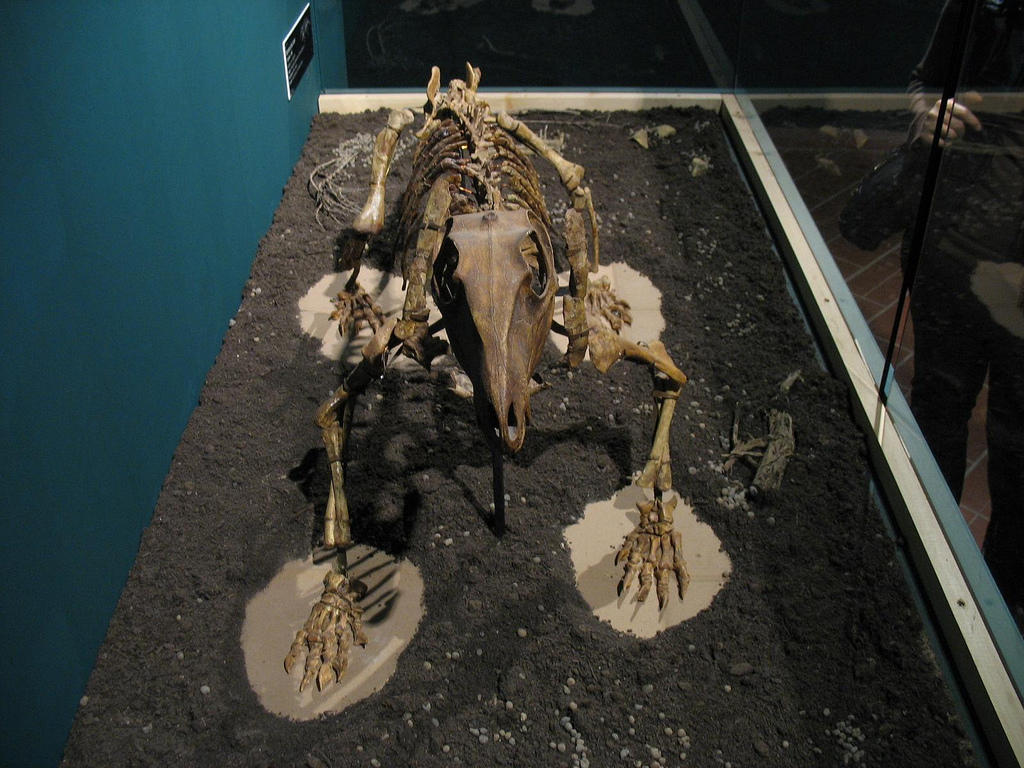 Il tesoro paleontologico della Russia